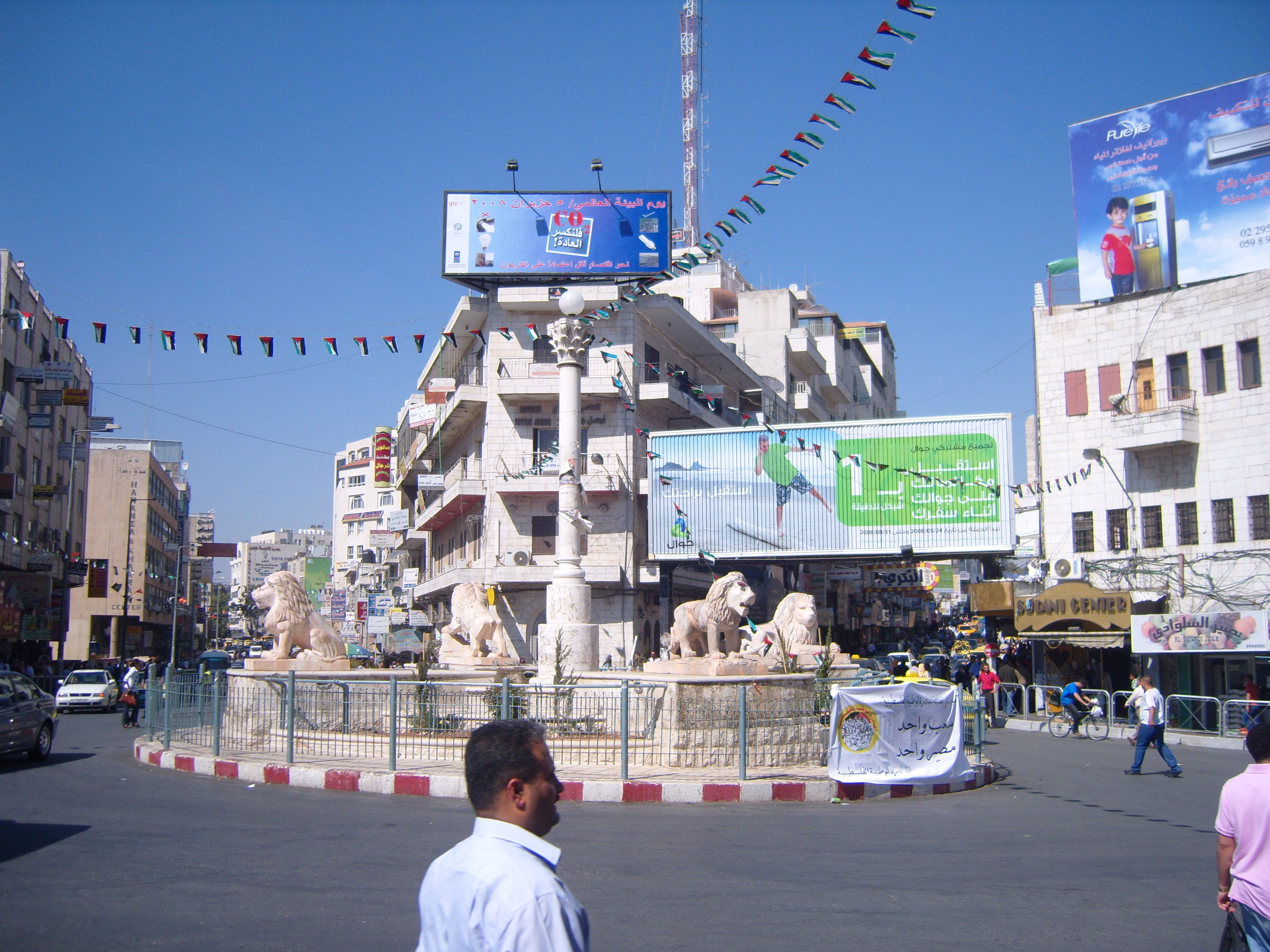 Célèbre place El-Manara à Ramallah